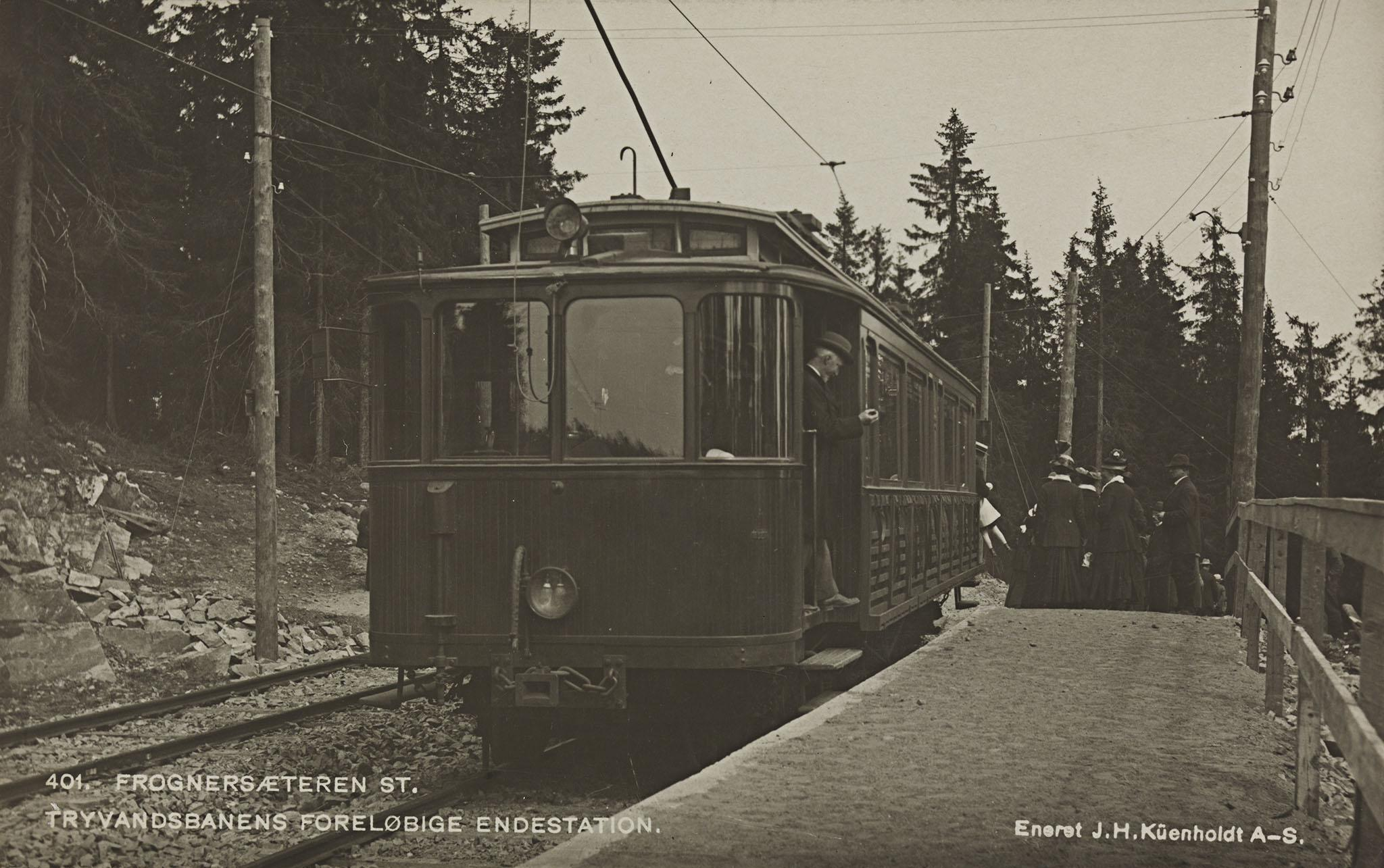 Tittel / Title: 401. Frognersæteren st. Tryvandsbanens foreløbige endestation Beskrivelse / Description: Postkort. Dato / Date: ukjent / unknown Fotograf / Photographer: ukjent / unknown Utgiver / Publisher: J. H. Küenholdt Sted / Place: Oslo, Frognerseteren stasjon Eier / Owner Institution: Nasjonalbiblioteket / National Library of Norway Lenke / Link: Bildesignatur / Image Number: bldsa_PK02869